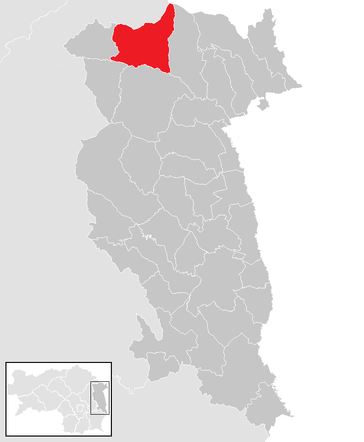 Lage von Waldbach-Mönichwald im Bezirk Hartberg-Fürstenfeld